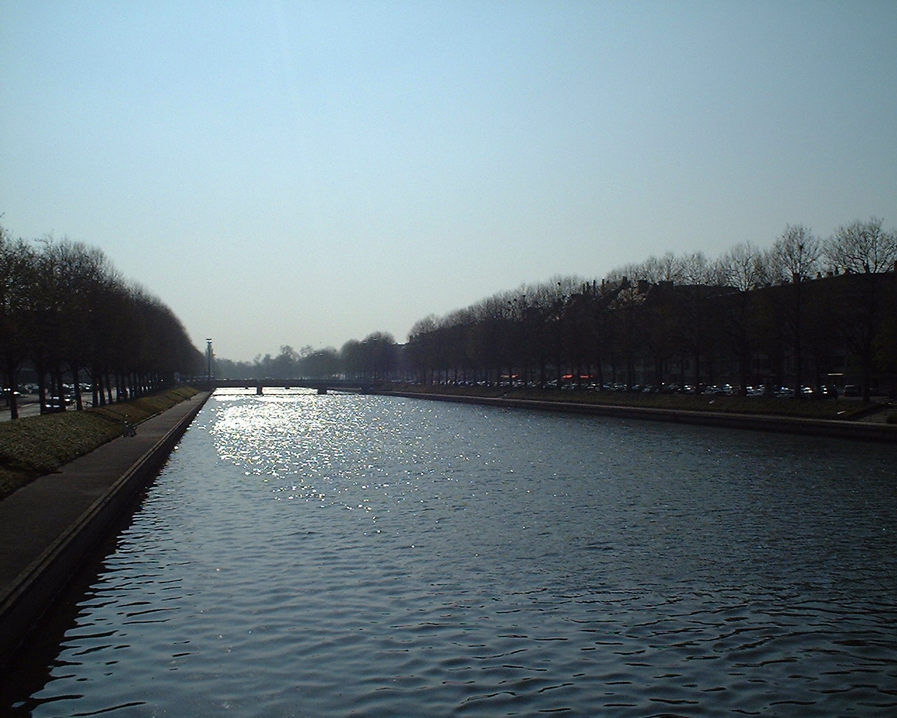 L'Orne à Caen, canalisée dans la deuxième partie du XVIIIe siècle.